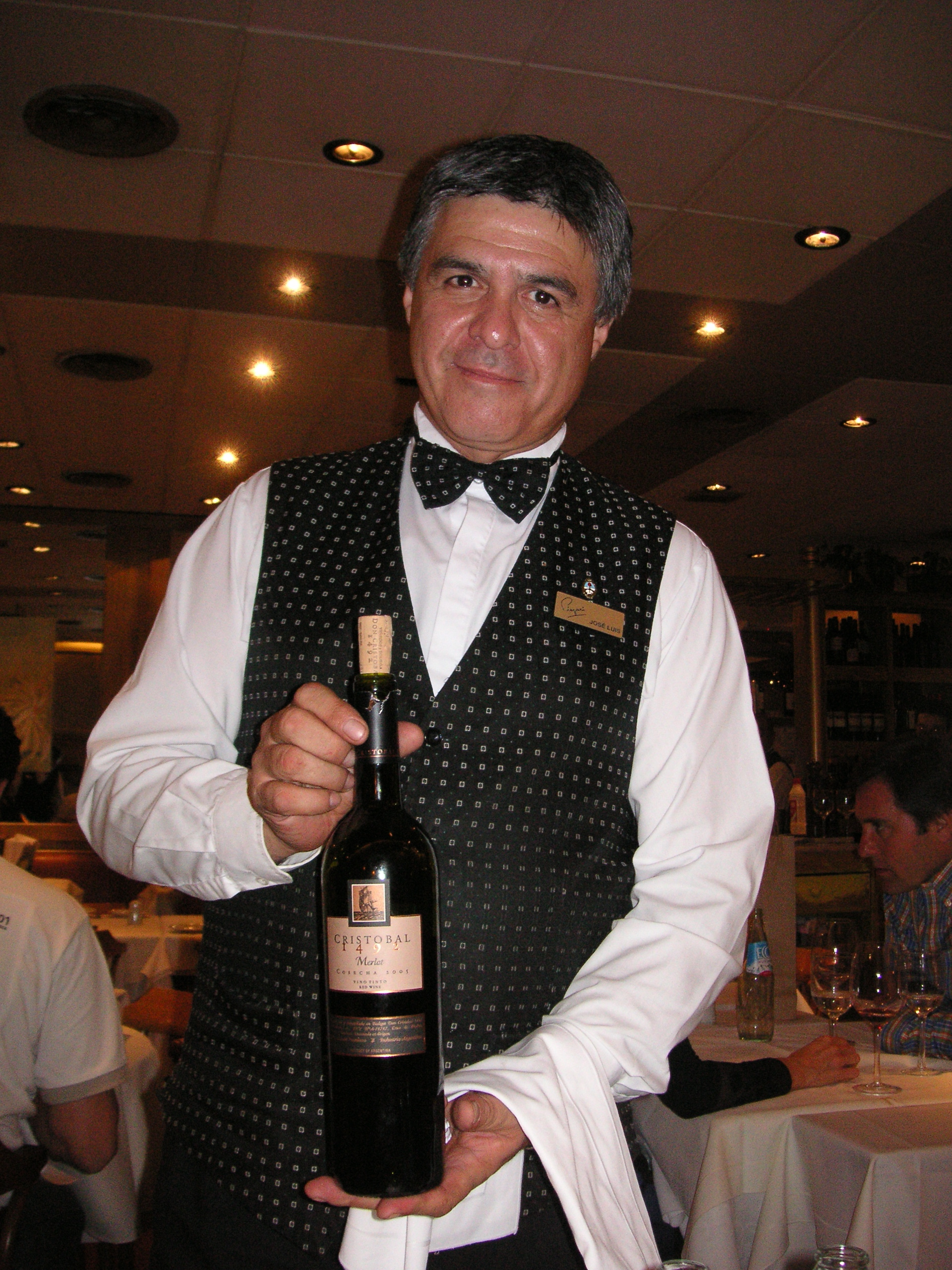 Waiter